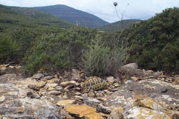 Eine Landschildkröte in ihrem kargen Lebensraum auf Sardinien